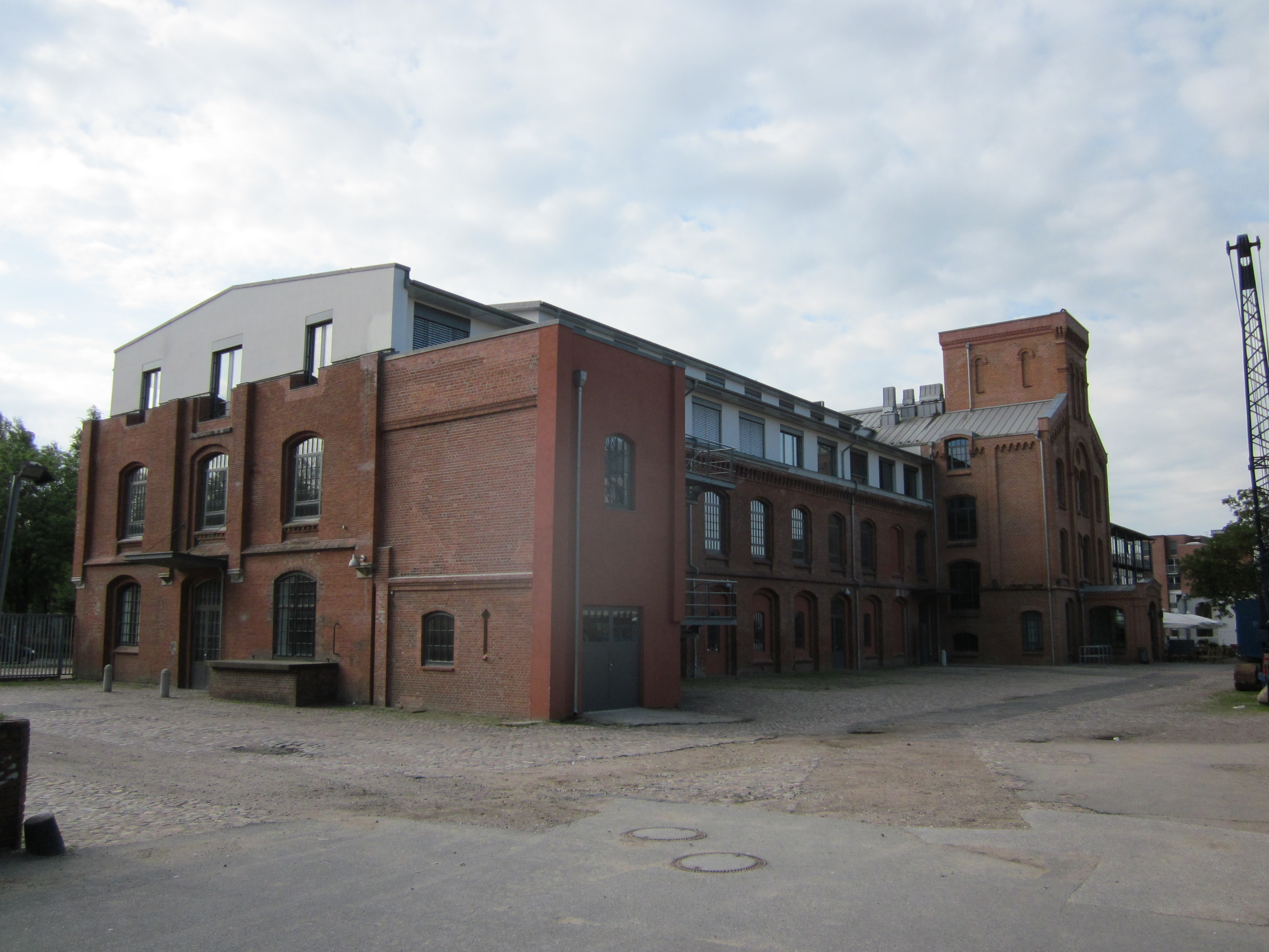 Die Alte Fabrik der Hamburg-New Yorker-Gummiwaaren-Compagnie von 1871/72 beherbergt heute Teile des Museums der Arbeit und das Restaurant "Trude". Sie steht - wie das gesamte ehemalige Fabrikgelände - seit 1996 unter Denkmalschutz.This is a photograph of an architectural monument.